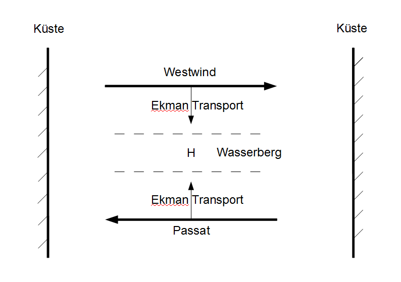 Schema der Erhöhung des Meeresspiegels durch den Ekman-Transport zwischen Westwind und Passatzone